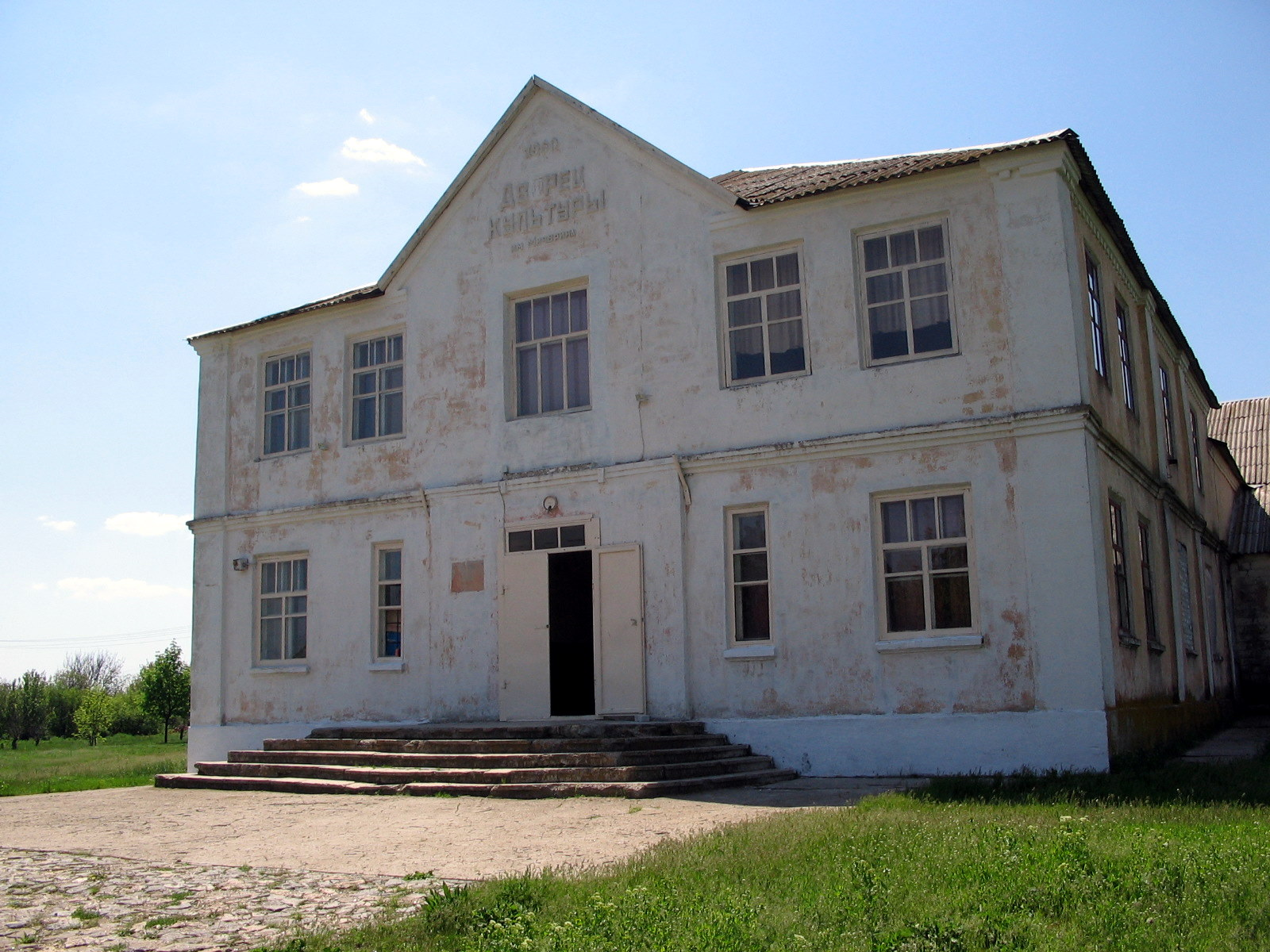 Сельский клуб